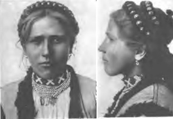 N33. Дося Клемпатюк, 16 років. Зріст 1530, г.п. 82,8, вол. біляве, очи ясні. Ясенів (Körösm).